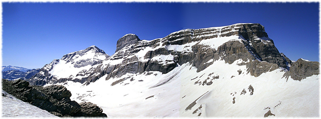 Pic du Marboré à droite au premier plan, puis Cylindre du Marboré au centre, et Mont Perdu au fond à gauche.